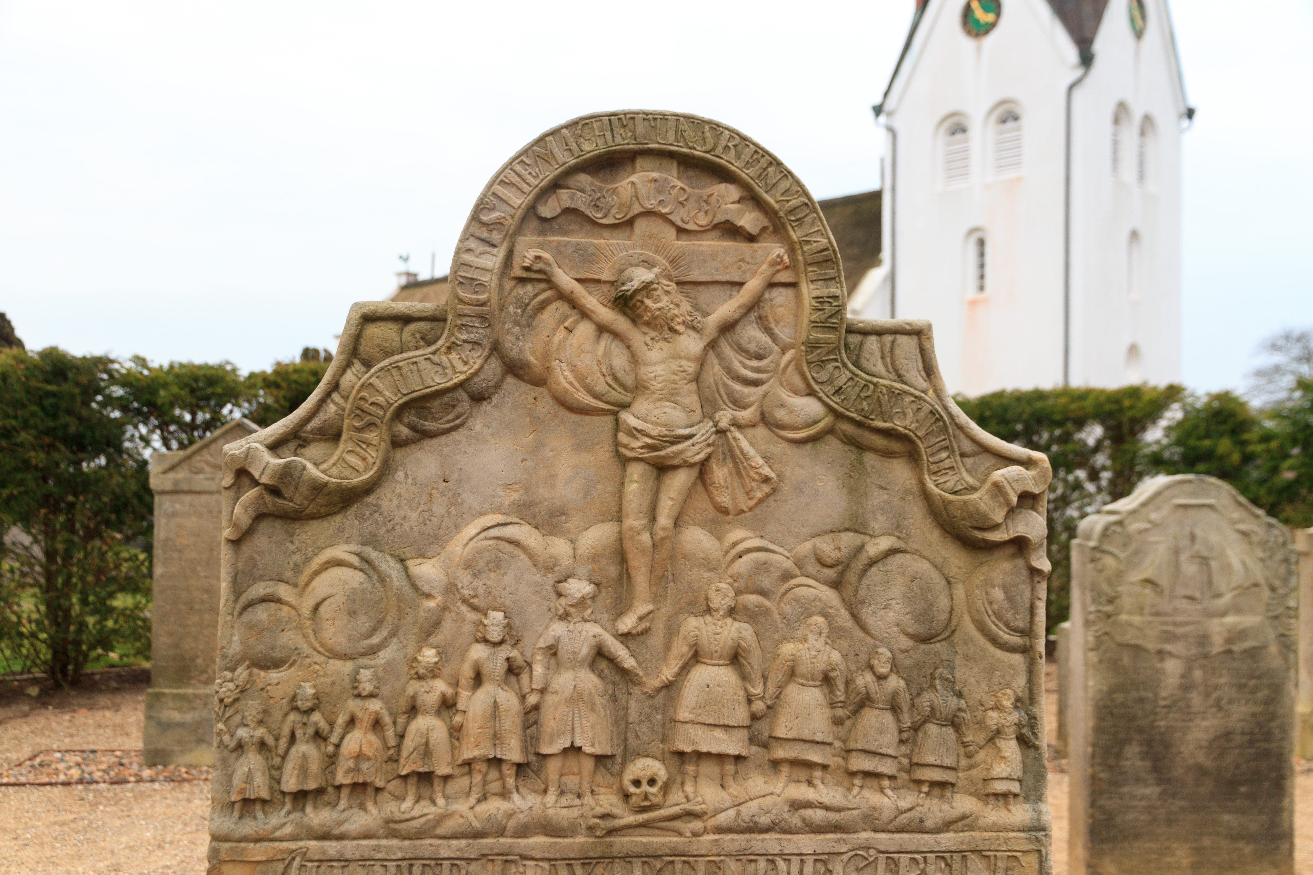 Amrum Grabstein auf dem Friedhof von Nebel